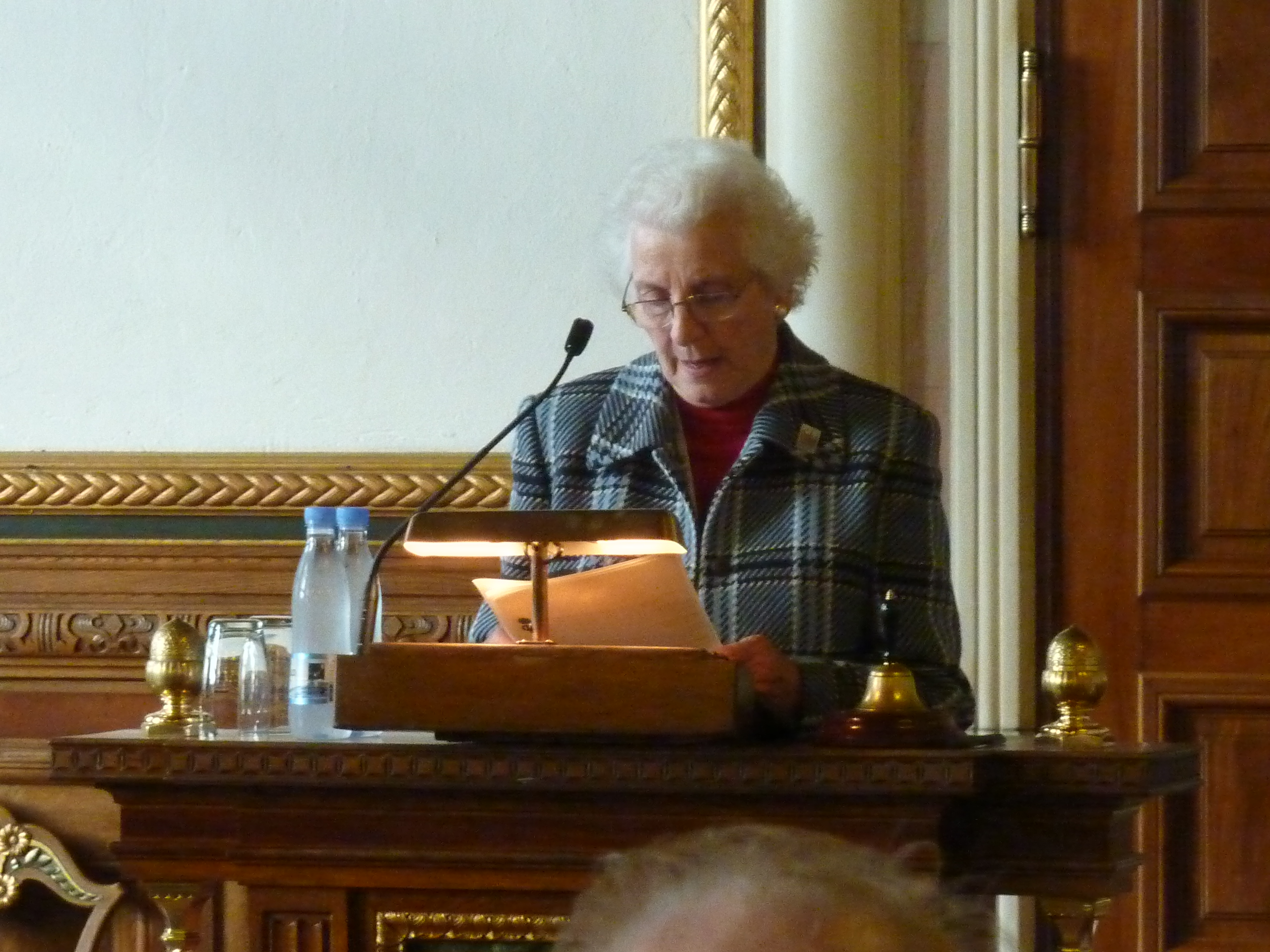 Ileana Schrøder, prezidantino de la LKK de la 96-a UK en Kopenhago (2011), interpretas en esperanton la alparolon de la vicurbestrino de Kopenhago al la invititaj kongresanoj en la kopenhaga urbodomo.